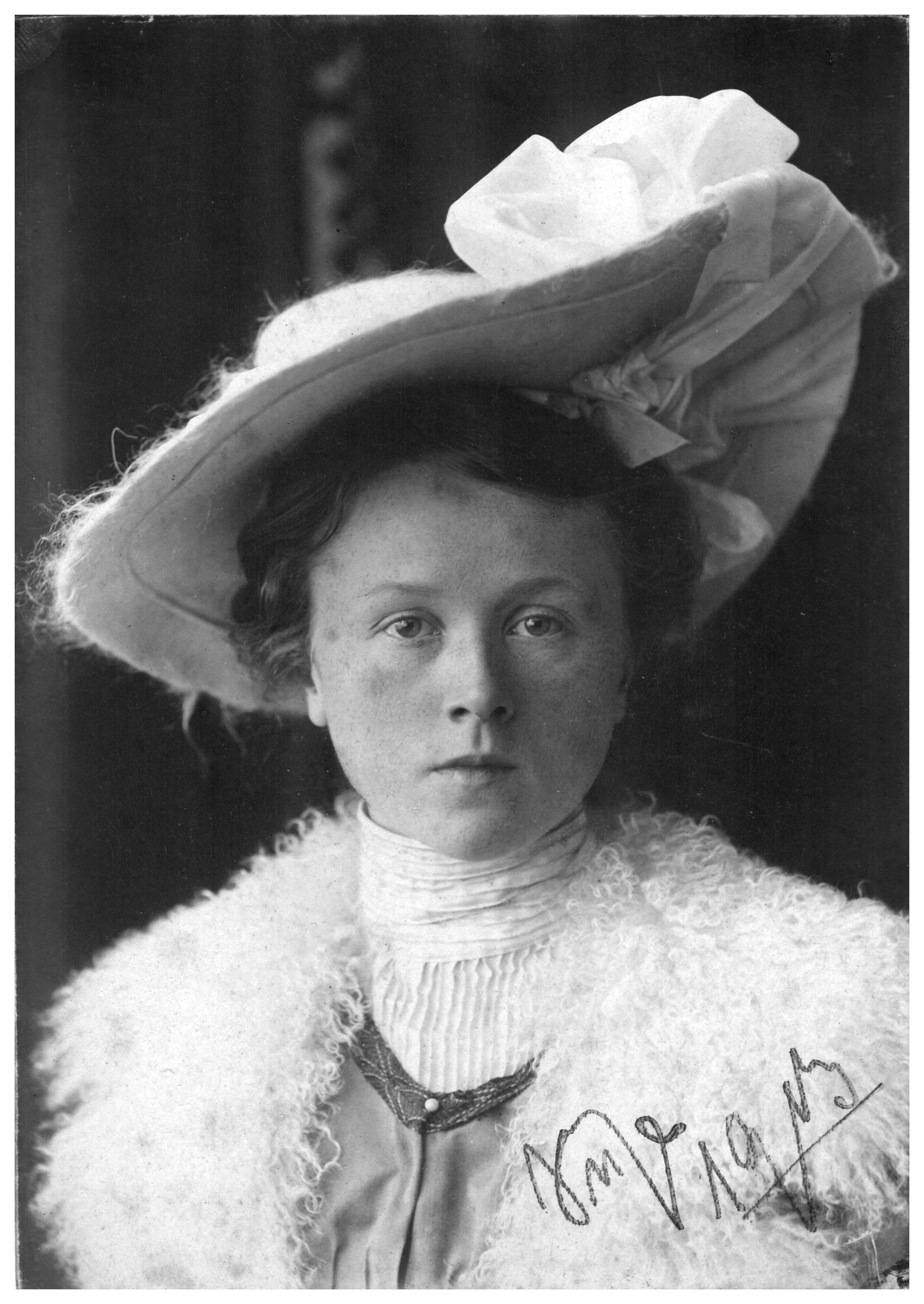 Das Photo zeigt die Künstlerin Agnes Susanne Scheurmann im Alter von 22 Jahren.